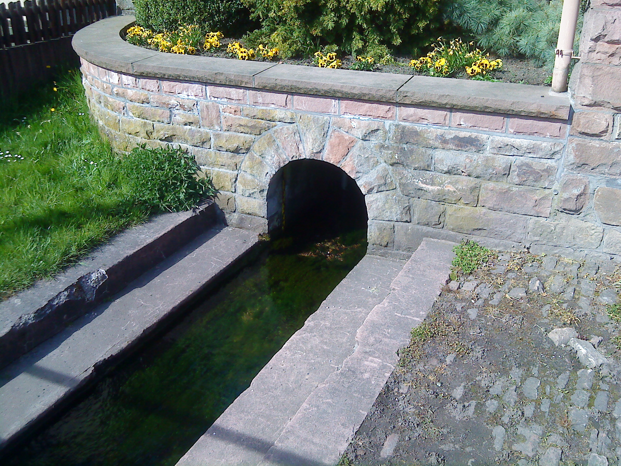 Die untere, stärkere Lohrbachquelle in Lohrhaupten